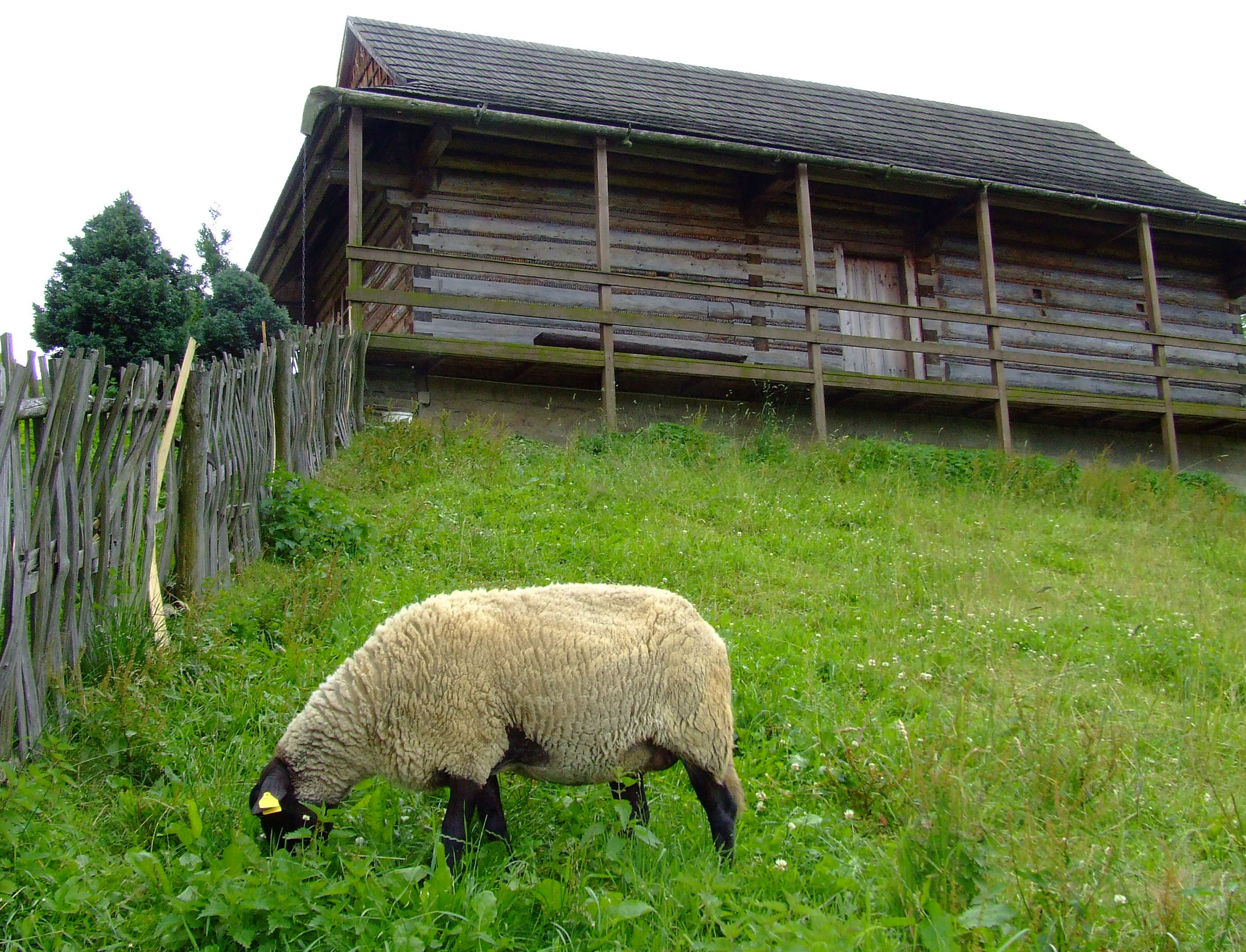 Jaworzynka. Muzeum Regionalne "Na Grapie".